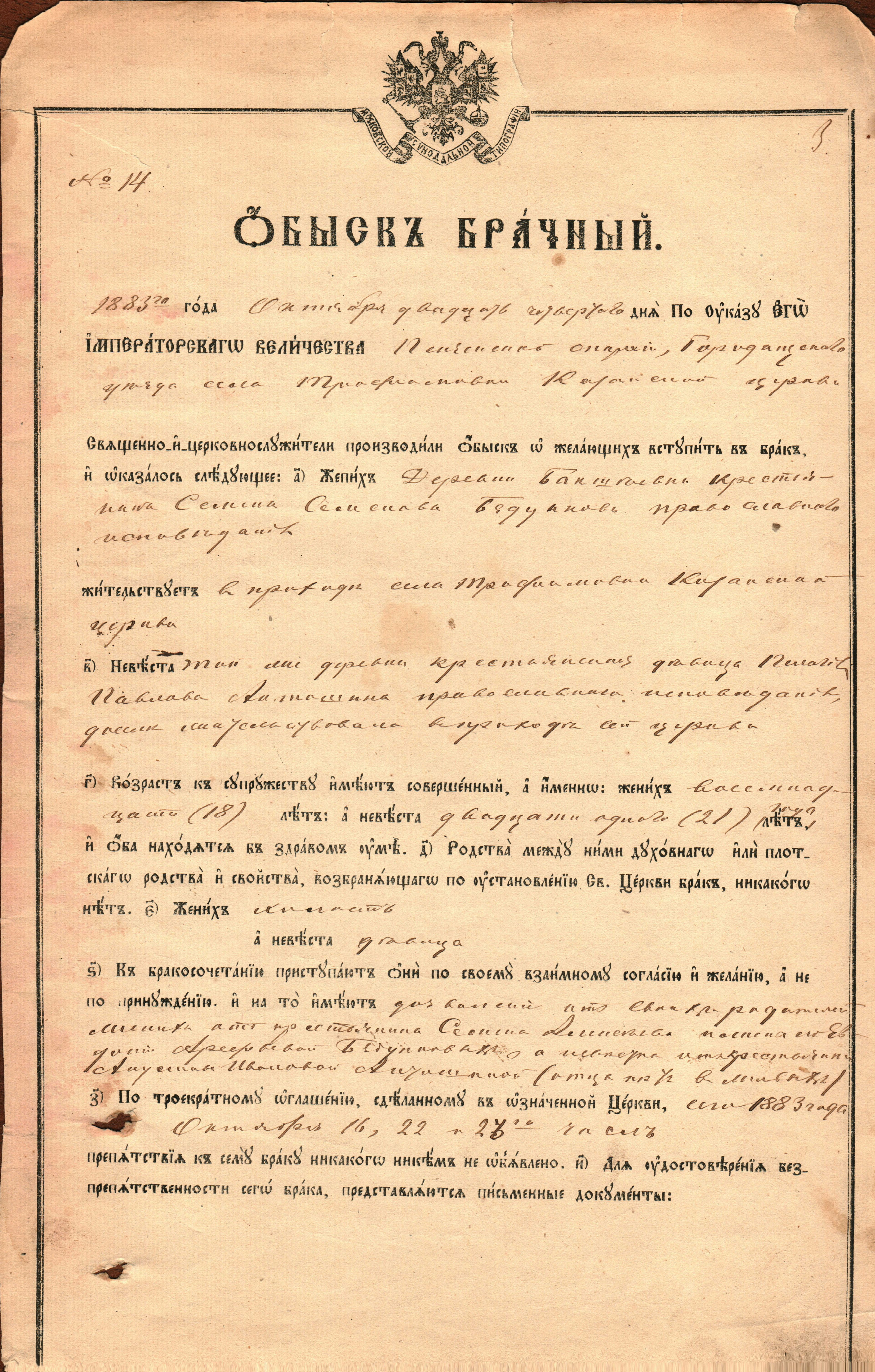 Обыск брачный (1883 год). Документ, устанавливающий отсутствие препятствий к венчанию православных жениха и невесты